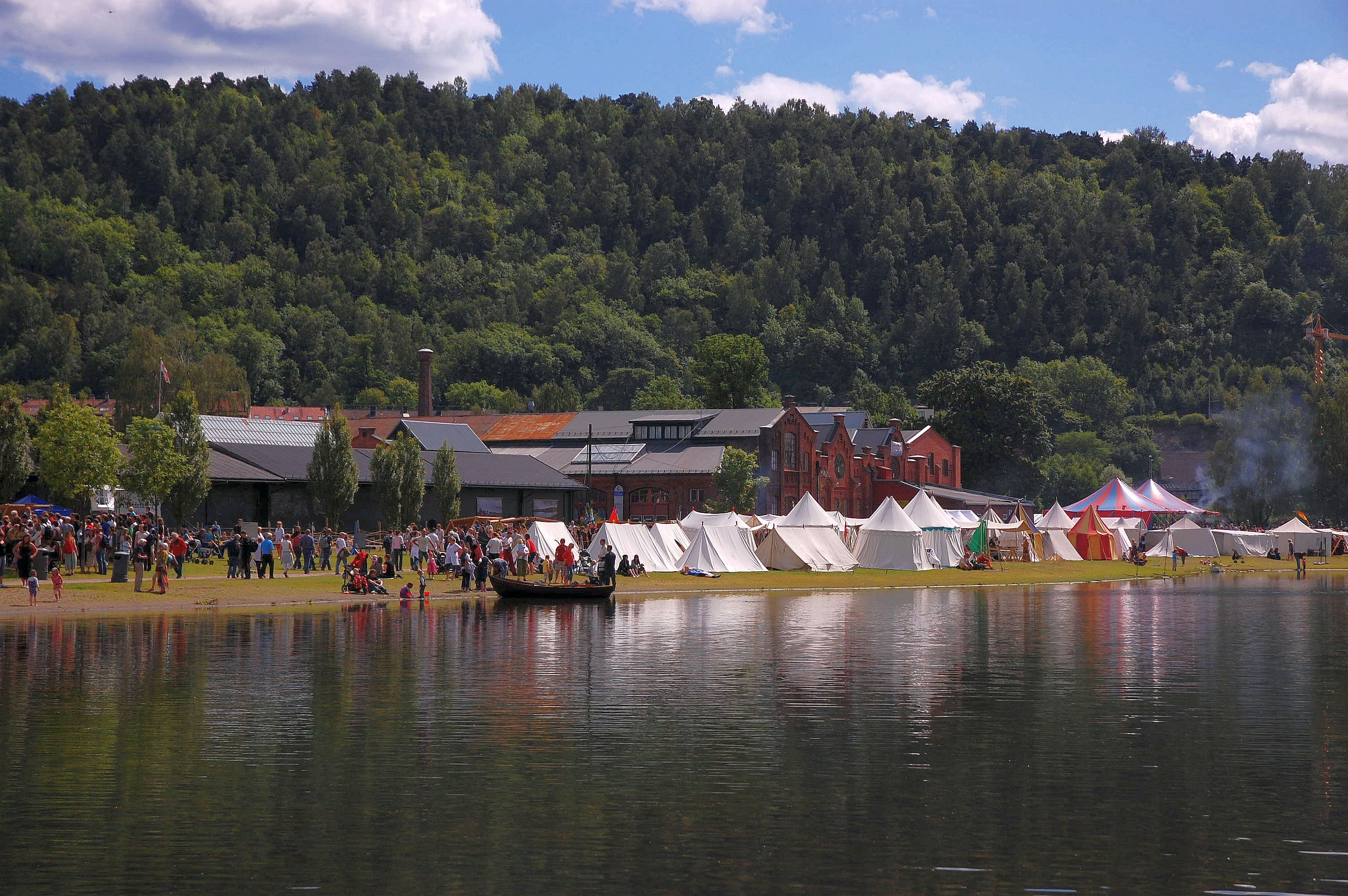 Oslo Middelalderfestival 2009